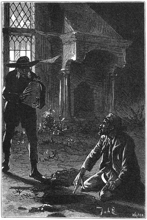 Mark Twains Dutch Translation 'De Lotgevallen van Tom Sawyer' painting from Johan Braakensiek